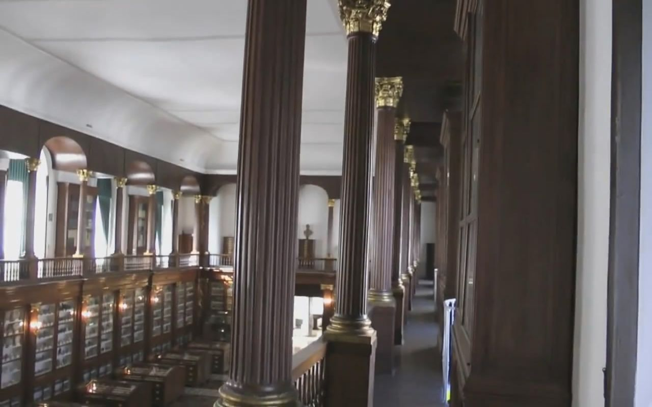 Museo di Mineralogia di Napoli